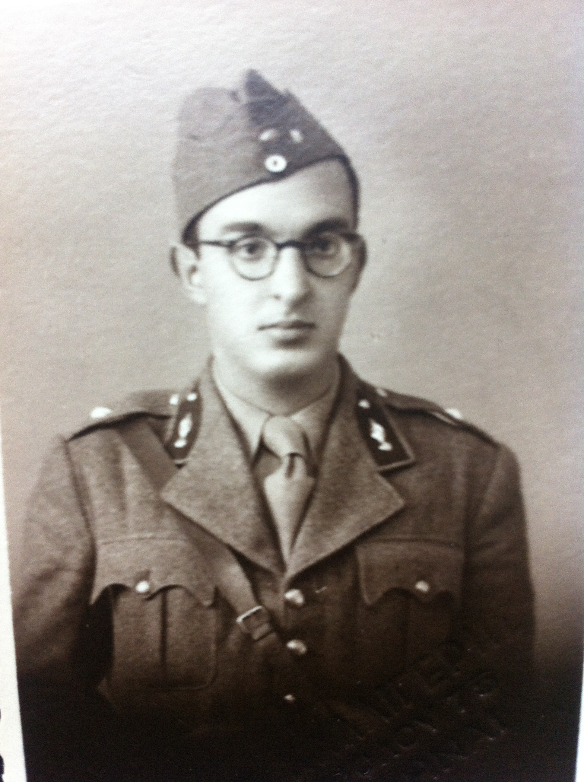 Mvskoke: Ο Δασκαλάκης έφερδος αξιωματικός, 9 Μαιού 1941